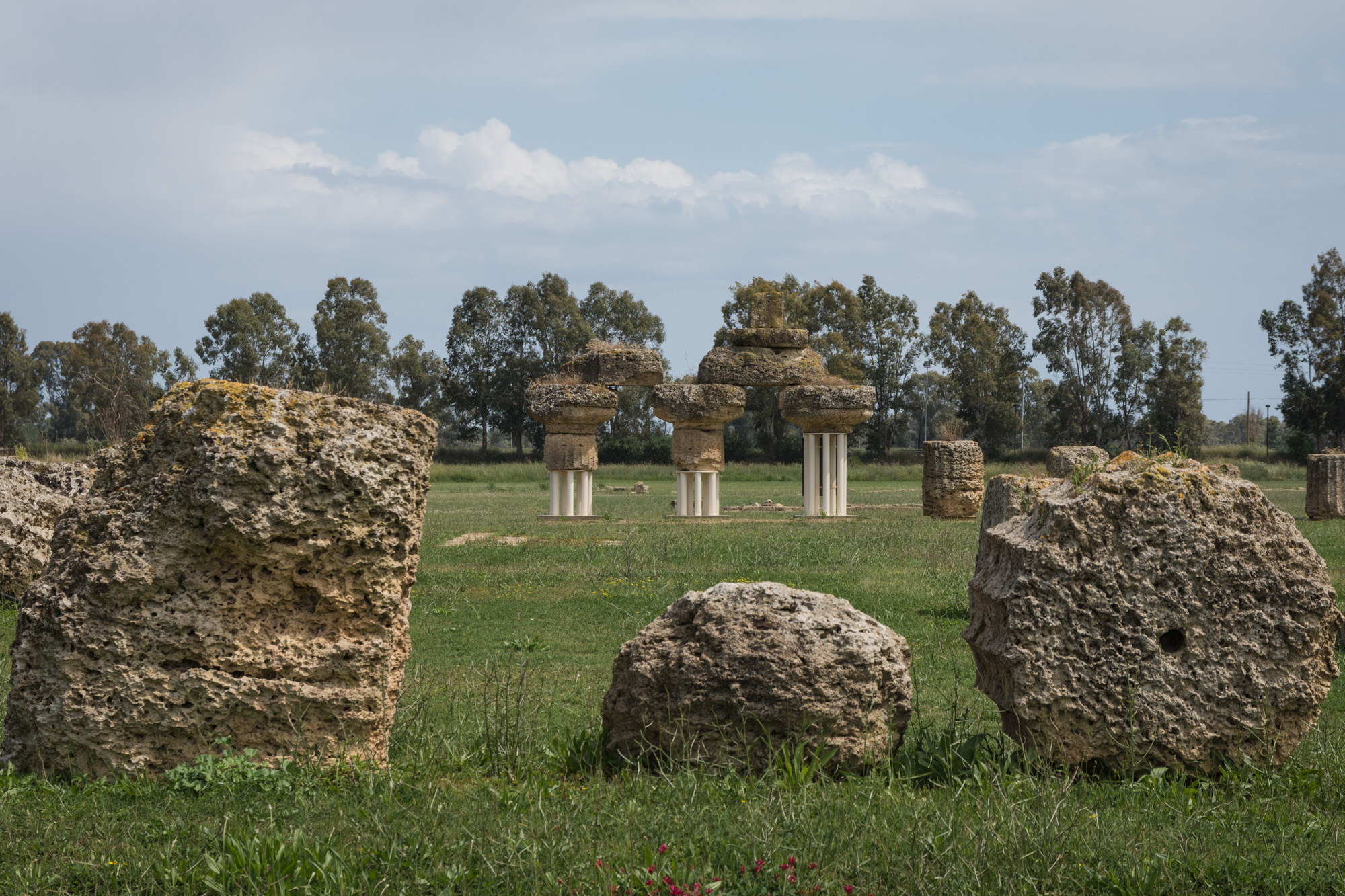 Museo Archeologico Nazionale di Metaponto This is a photo of a monument which is part of cultural heritage of Italy.